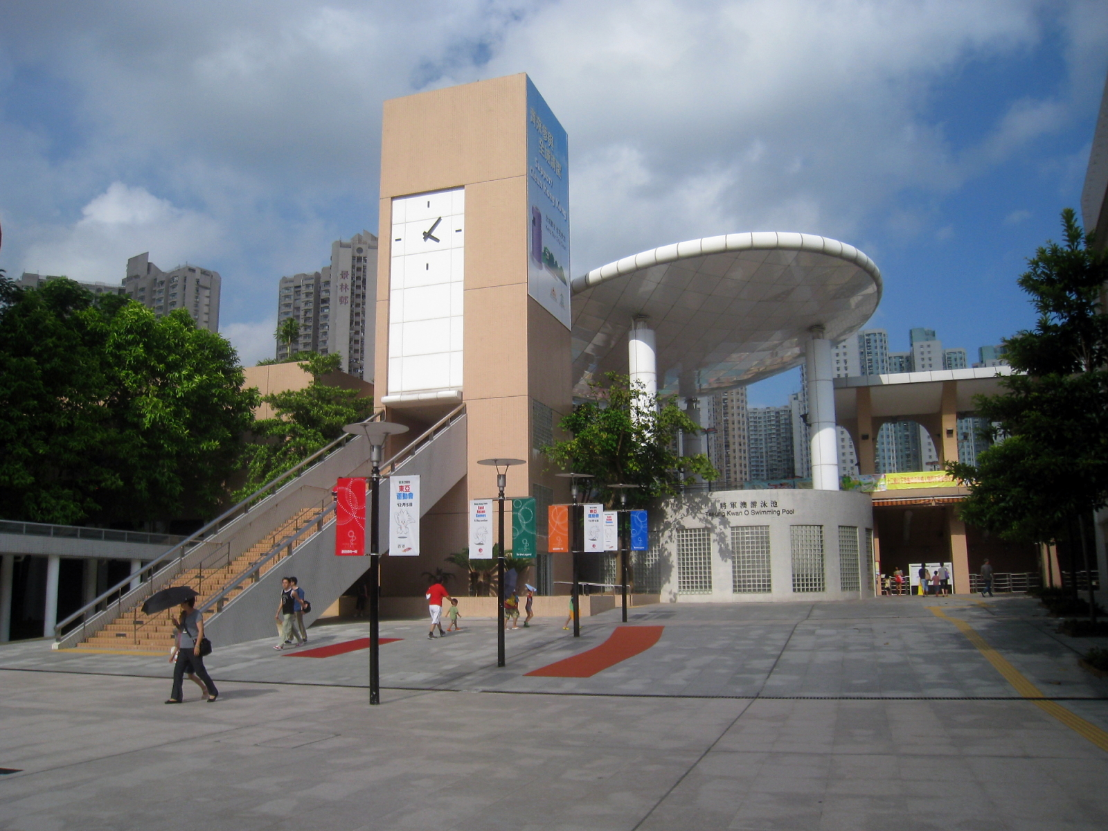 Tseung KwanO Swimming Pool Entrance